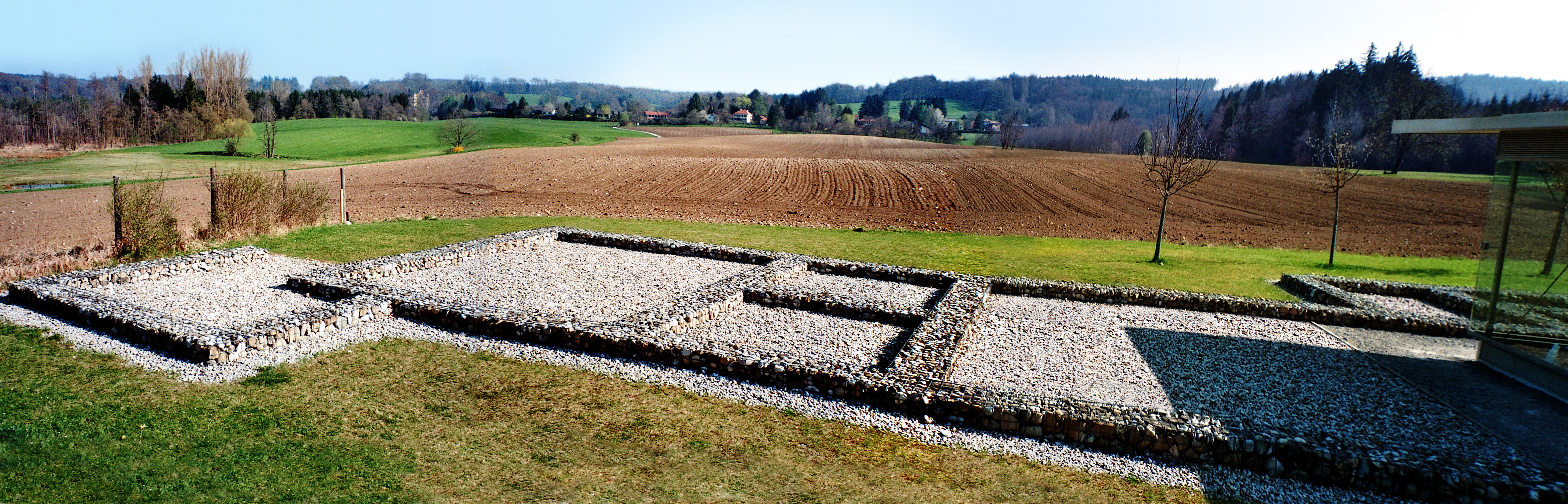 Außenbereich der Villa Rustica in Leutstetten, Landkreis Starnberg, Oberbayern. Im Hintergrund das Dorf Leutstetten. Der Grundriß ganz links gehörte zu einem Keller.